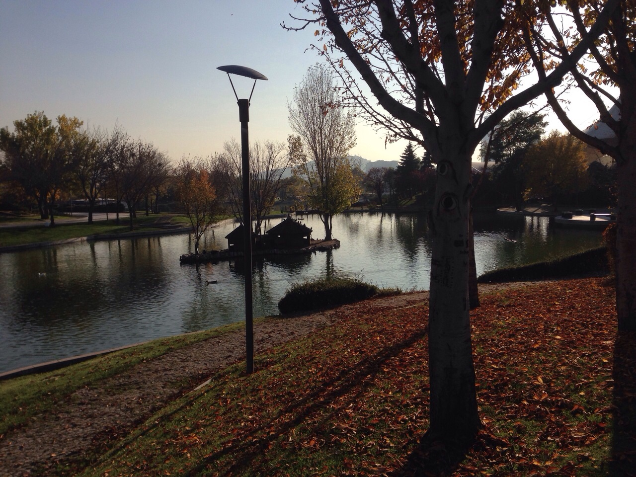 Ankara ili'nin büyük parklarından olup Altındağ ilçesinde bulunan Altınpark'dan görünüm (2014).